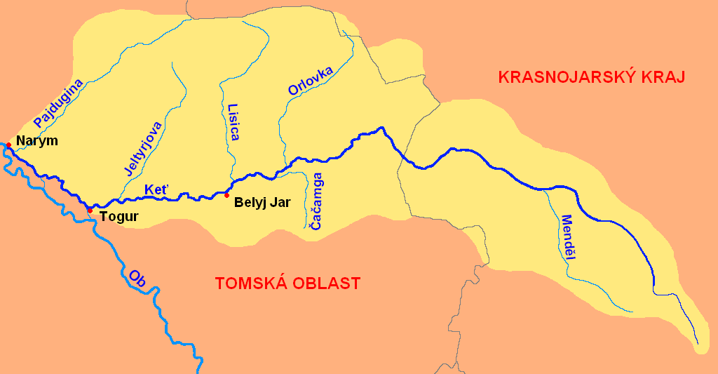 Povodí řeky Keť